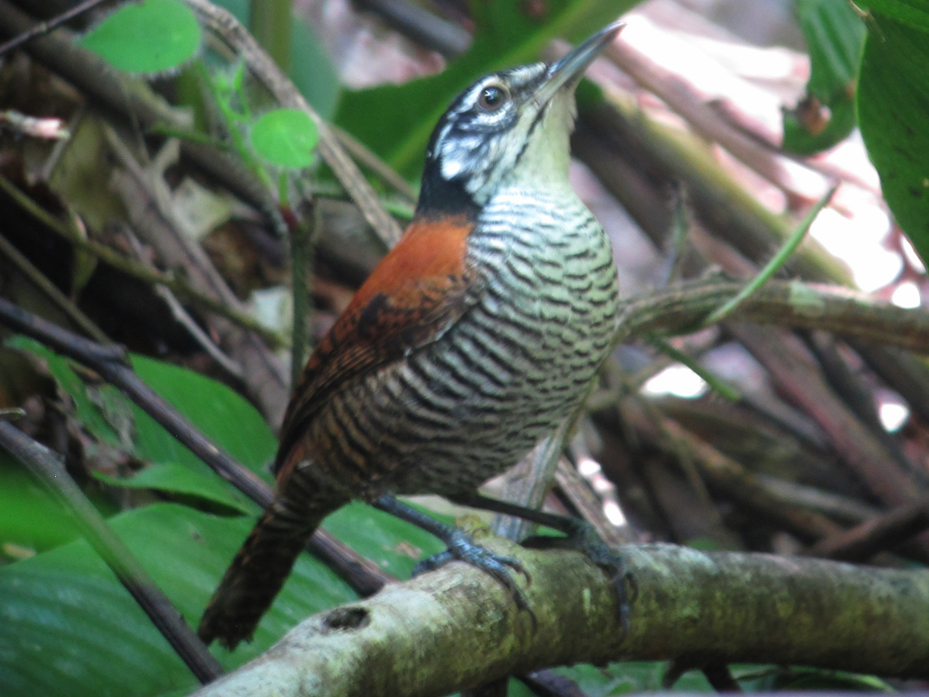 Doradal, Antioquia, Colombia